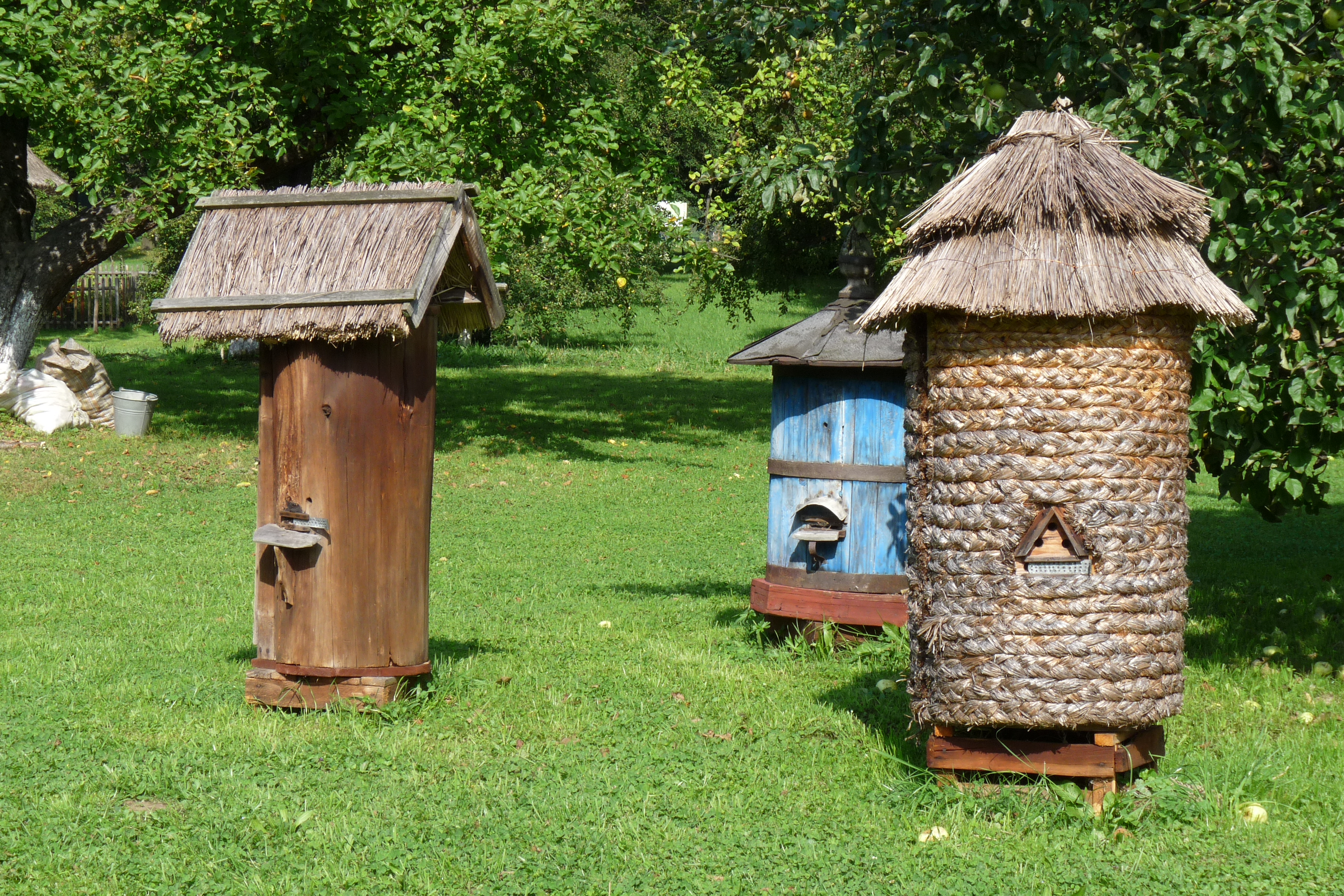 Beehives in Open-air Museum of the Polish Uplanders Countryside in Szymbark